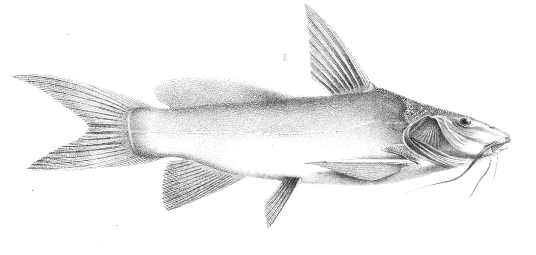 Ancharius fuscus